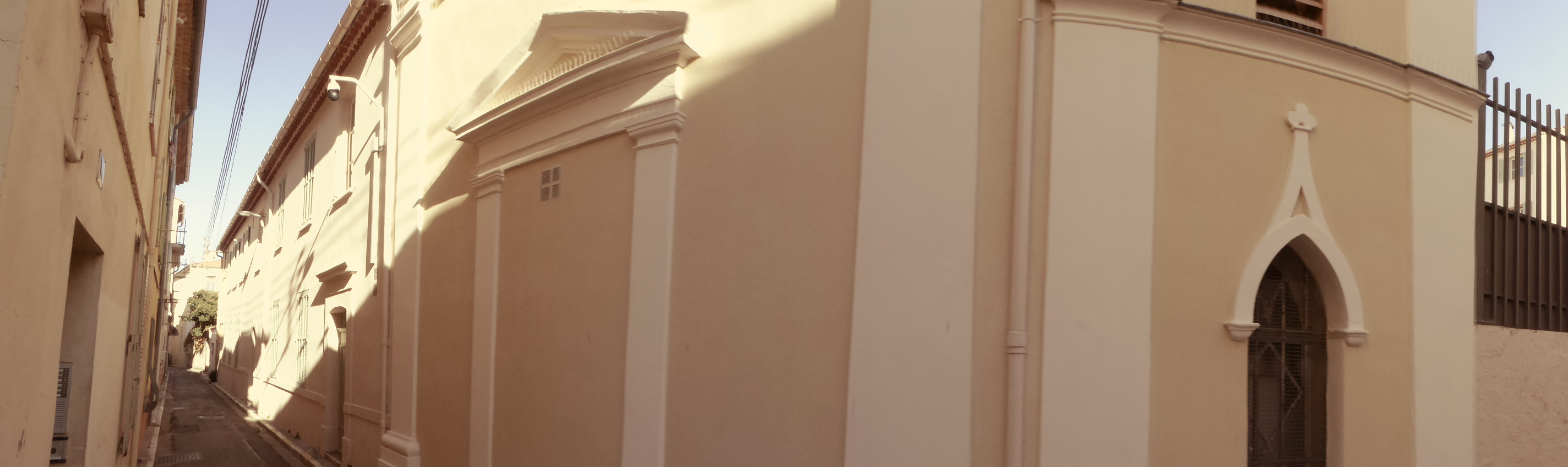 streets in Antibes